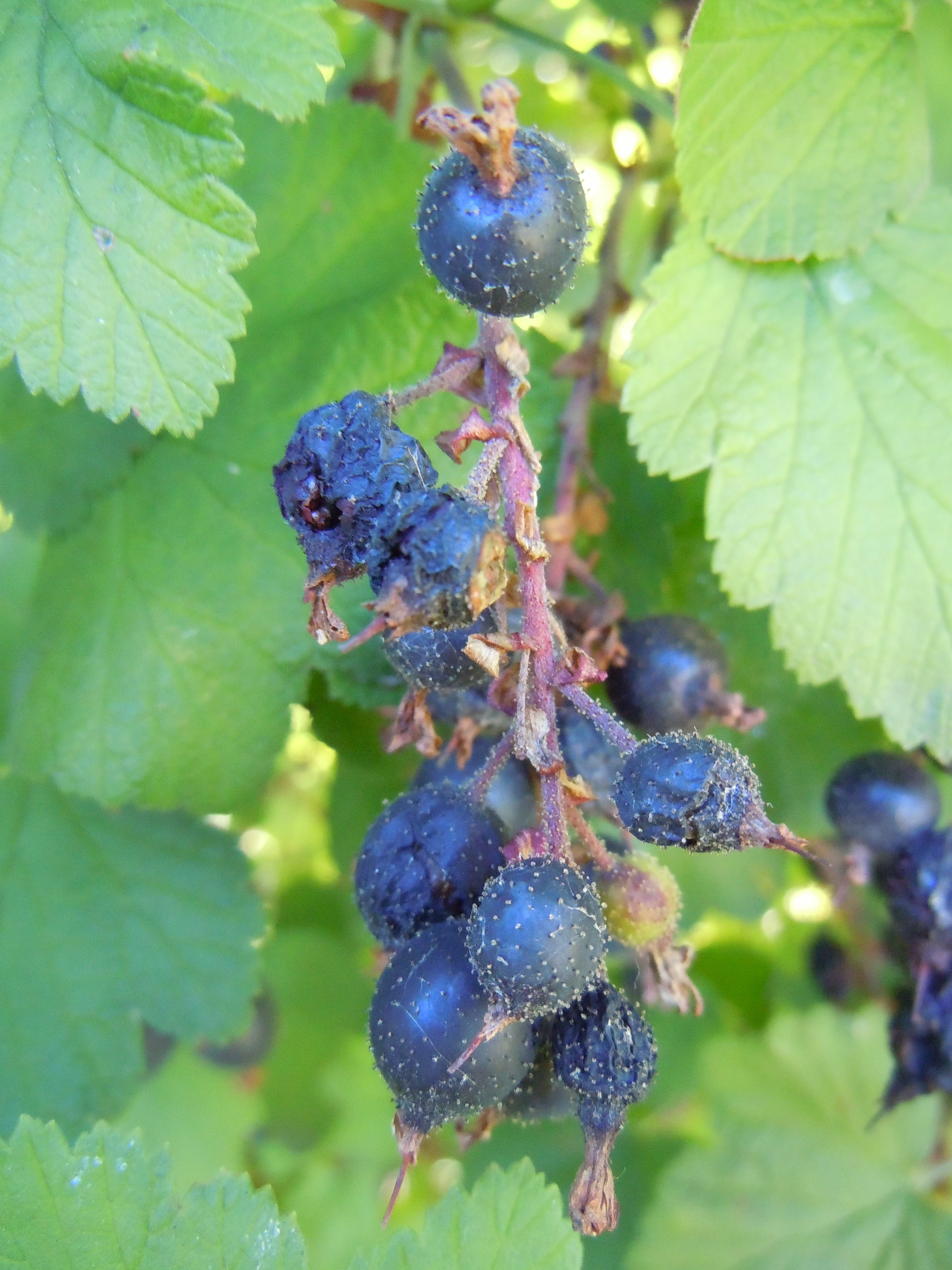 Ribes sanguineum Fruits - Cultivar - Ile de France